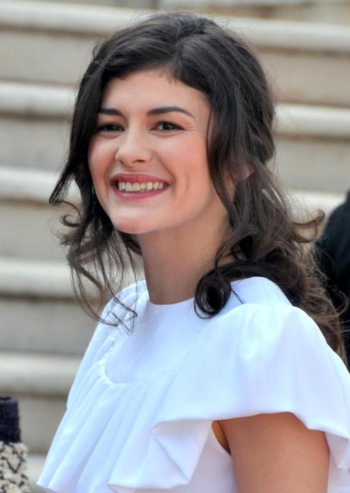 Audrey Tautou au festival de Cannes